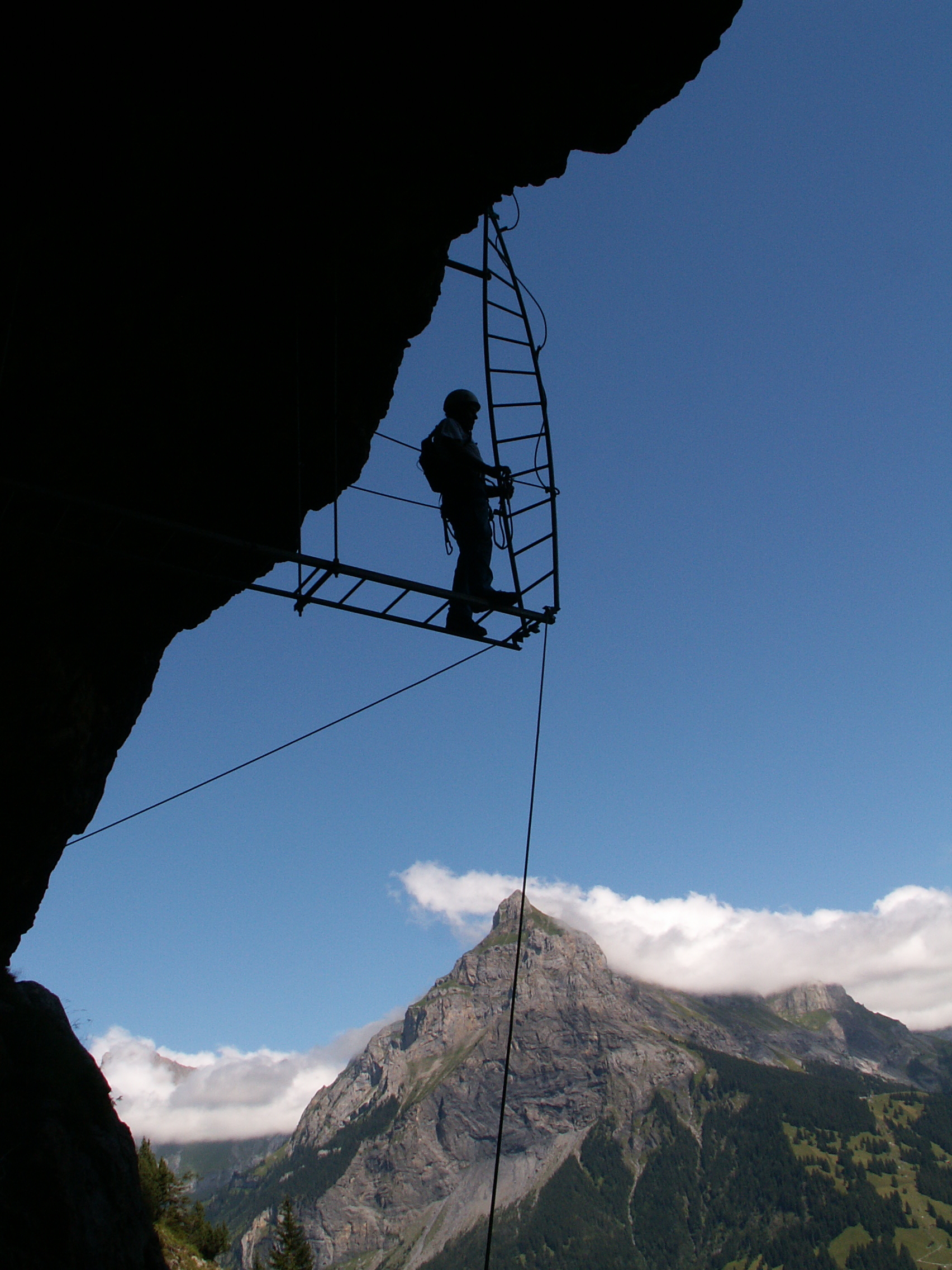 Klettersteig Allmenalp Kandersteg Schweiz